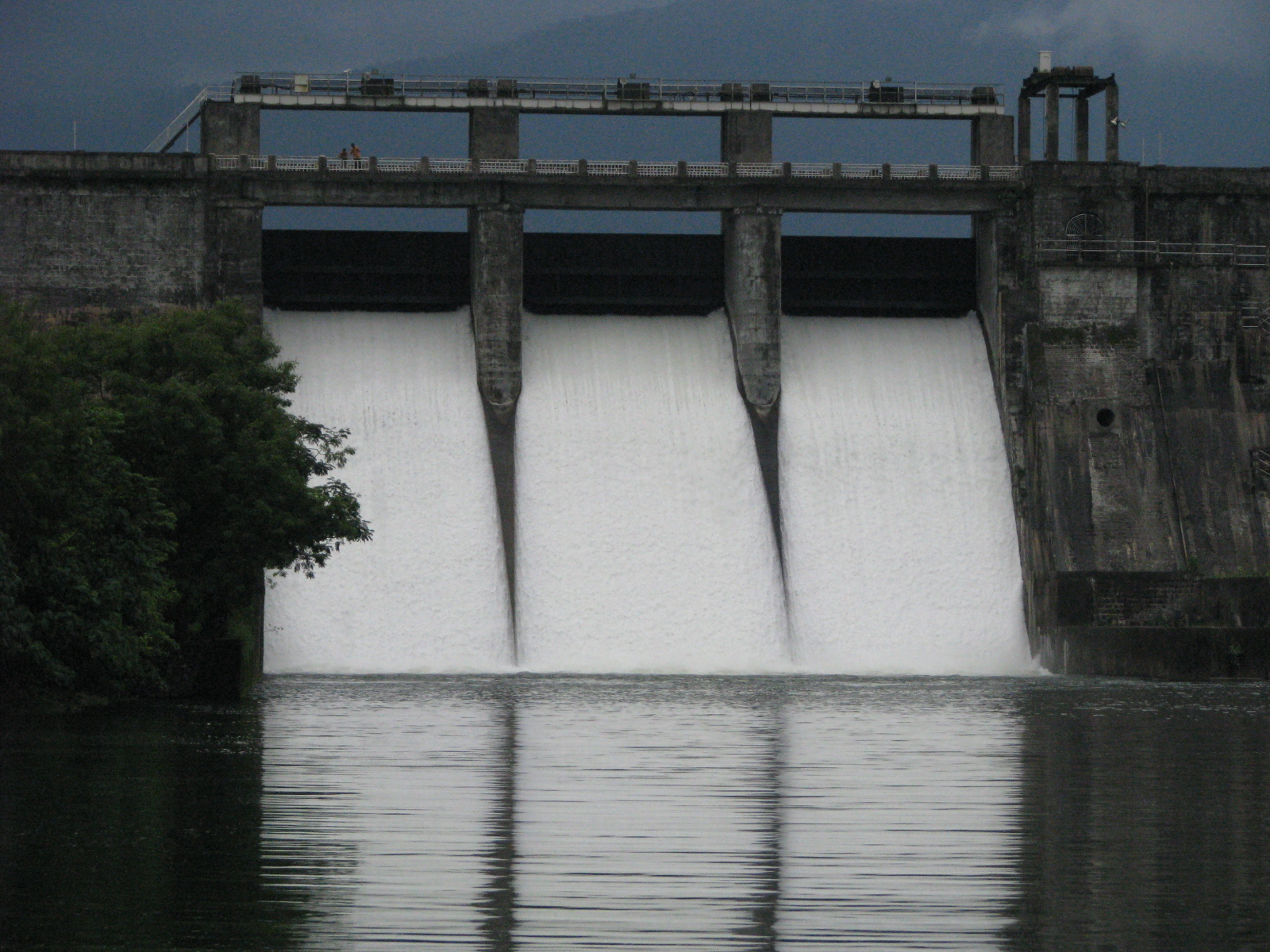 കാഞ്ഞിരപ്പുഴ അണക്കെട്ടിന്റെ ഒരു സമീപദൃശ്യം